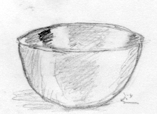 cul de poule, bassine, matériel de cuisine